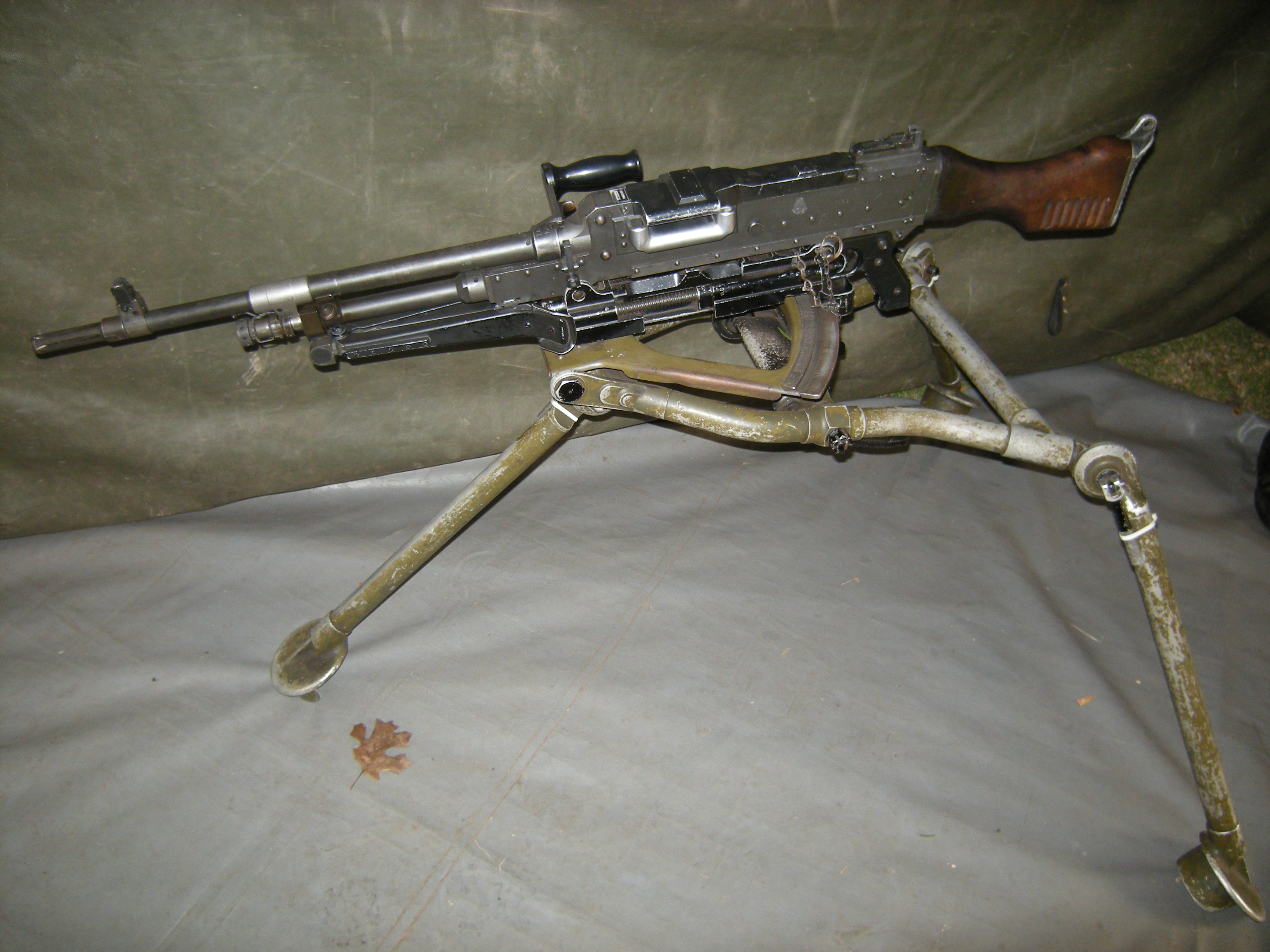 Metralladora FN MAG del Ejército Argentino con trípode instalado